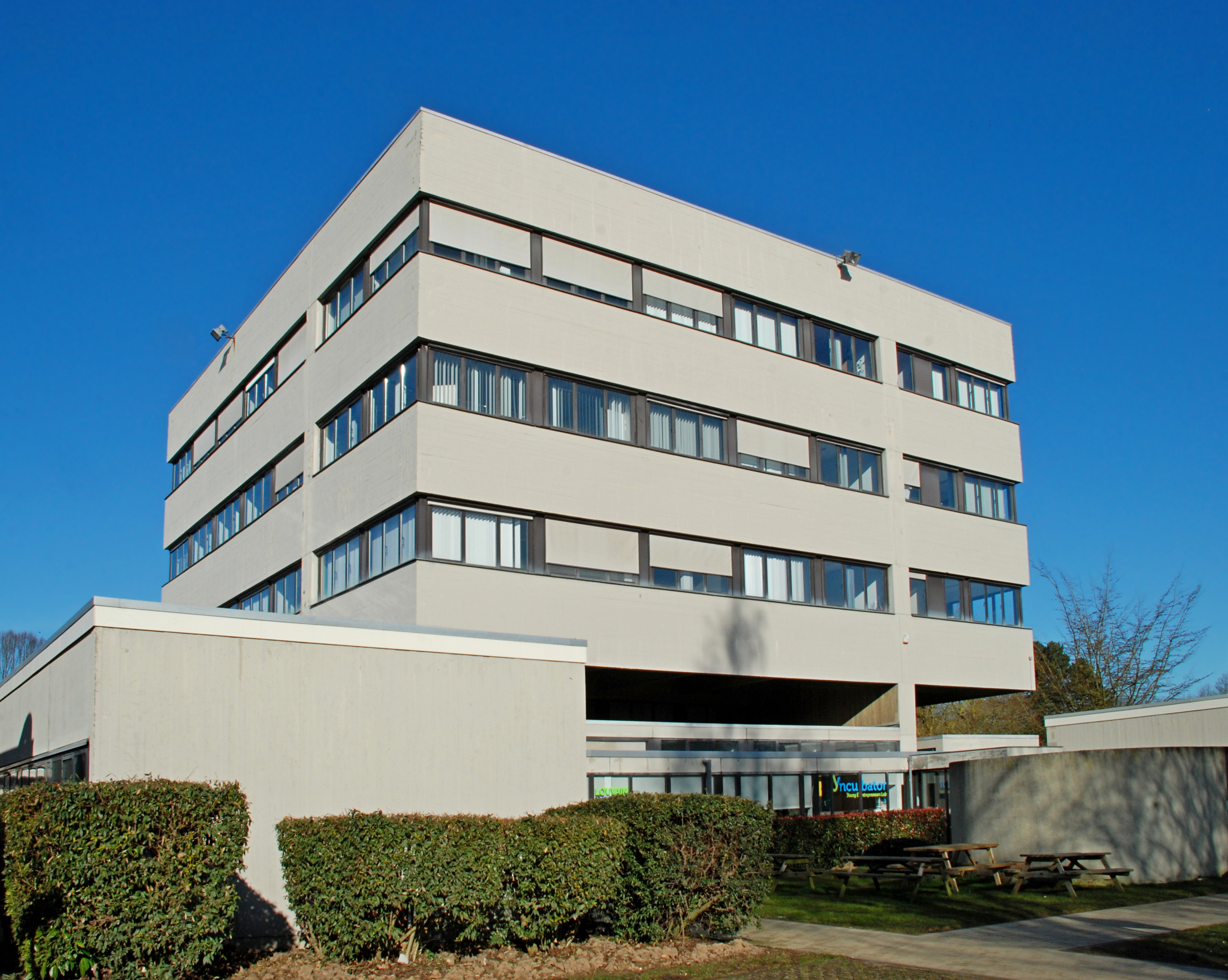 Belgique - Brabant wallon - Louvain-la-Neuve - Cyclotron (chemin du Cyclotron, architecture de style brutaliste, 1970-1972) : Tour est This photo of immovable heritage has been taken in the Walloon Region